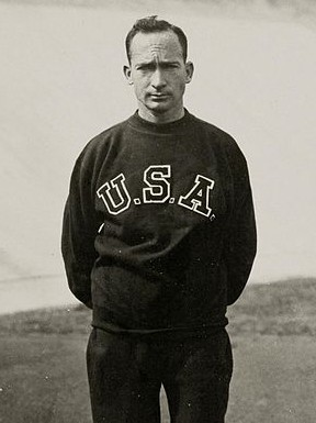 Sport. Olympische Spelen 1928 Amsterdam, Nederland : De Amerikaanse hardloper Jackson Scholz, kanshebber op de 200 meter hardlopen, hier in trainingspak.